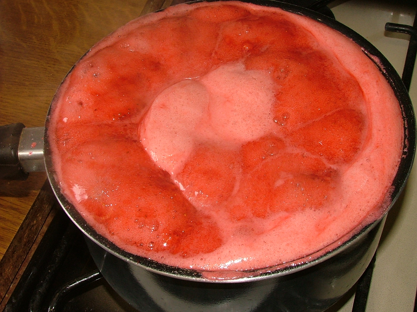 Making jam at home